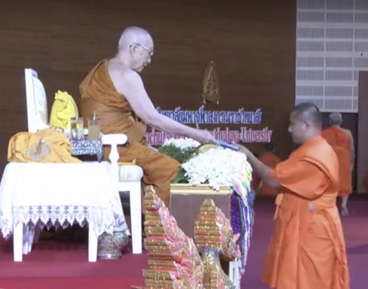 เจ้าอาวาสวัดหนองมงคล